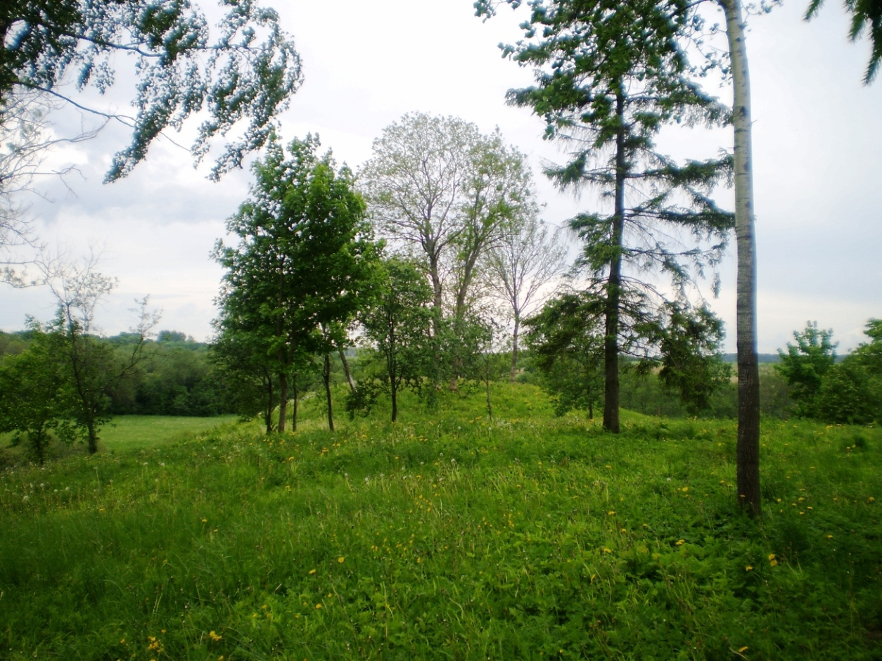 Plinkaigalio piliakalnis, Kėdainių raj.